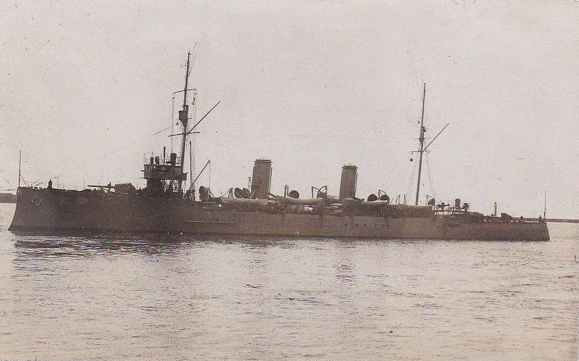 Crucero explorador B.A.P. Coronel Bolognesi 1º